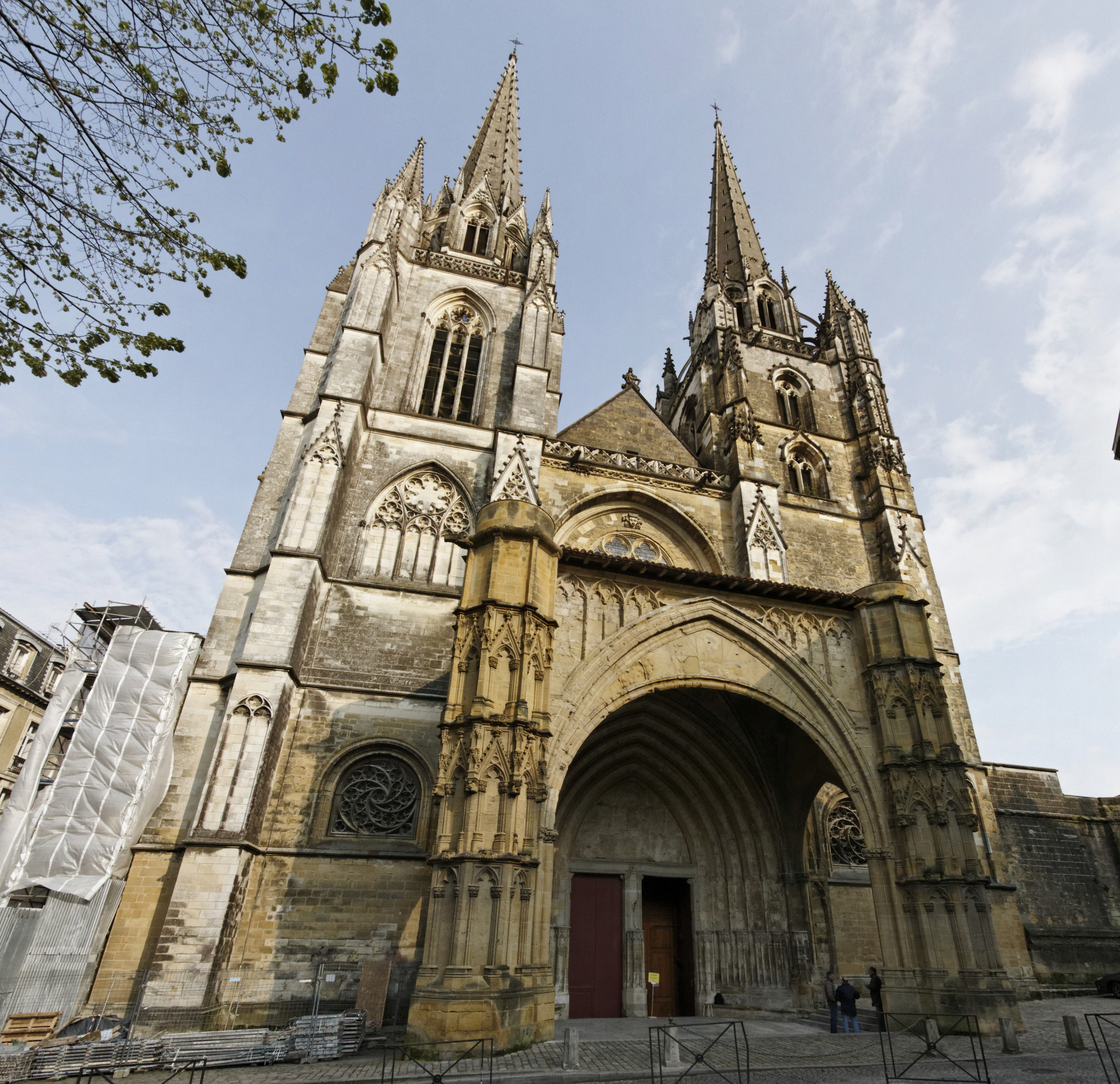 Cathédrale Notre-Dame de Bayonne (France)